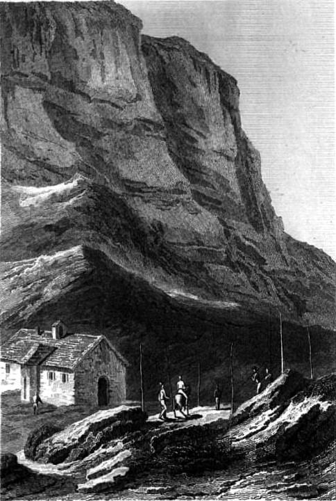 Image en provenance du livre : Eusèbe Girault de Saint-Fargeau, Guide pittoresque du voyageur en France, contenant la statistique et la description complète des quatre-vingt-six départements, orné de 740 vignettes et portraits gravés sur acier, de quatre-vingt-six cartes de départements et d'une grande carte routière de la France, par une Société de gens de lettres, de géographes et d'artistes, Paris, F. Didot frères, 1838, 6 volumes in-8° (BNF : 8-L25- 46). Volume III Didot frères, 1838. Route de Paris à Nice traversant les départements de l'Isère, des Hautes-Alpes, des Basses-Alpes et du Var. auteurs dessins : Rauch (ou autre) auteurs gravures : Skelton fils, Schroeder, Bishop (ou autre)